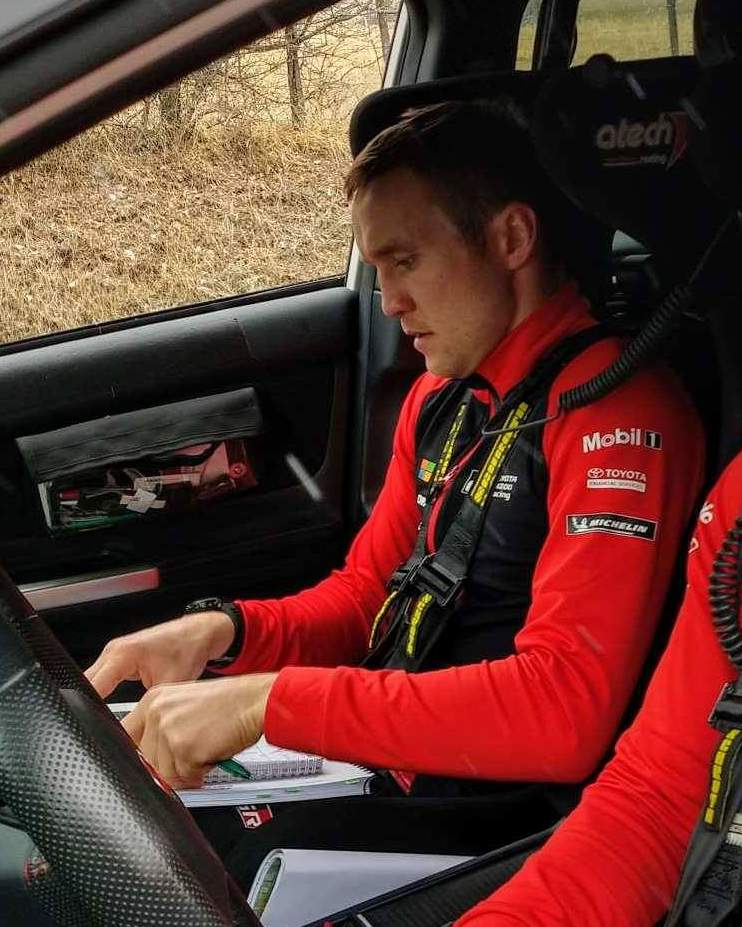 Martin Järveoja durant les reconnaissances du Rallye Monte-Carlo 2019.